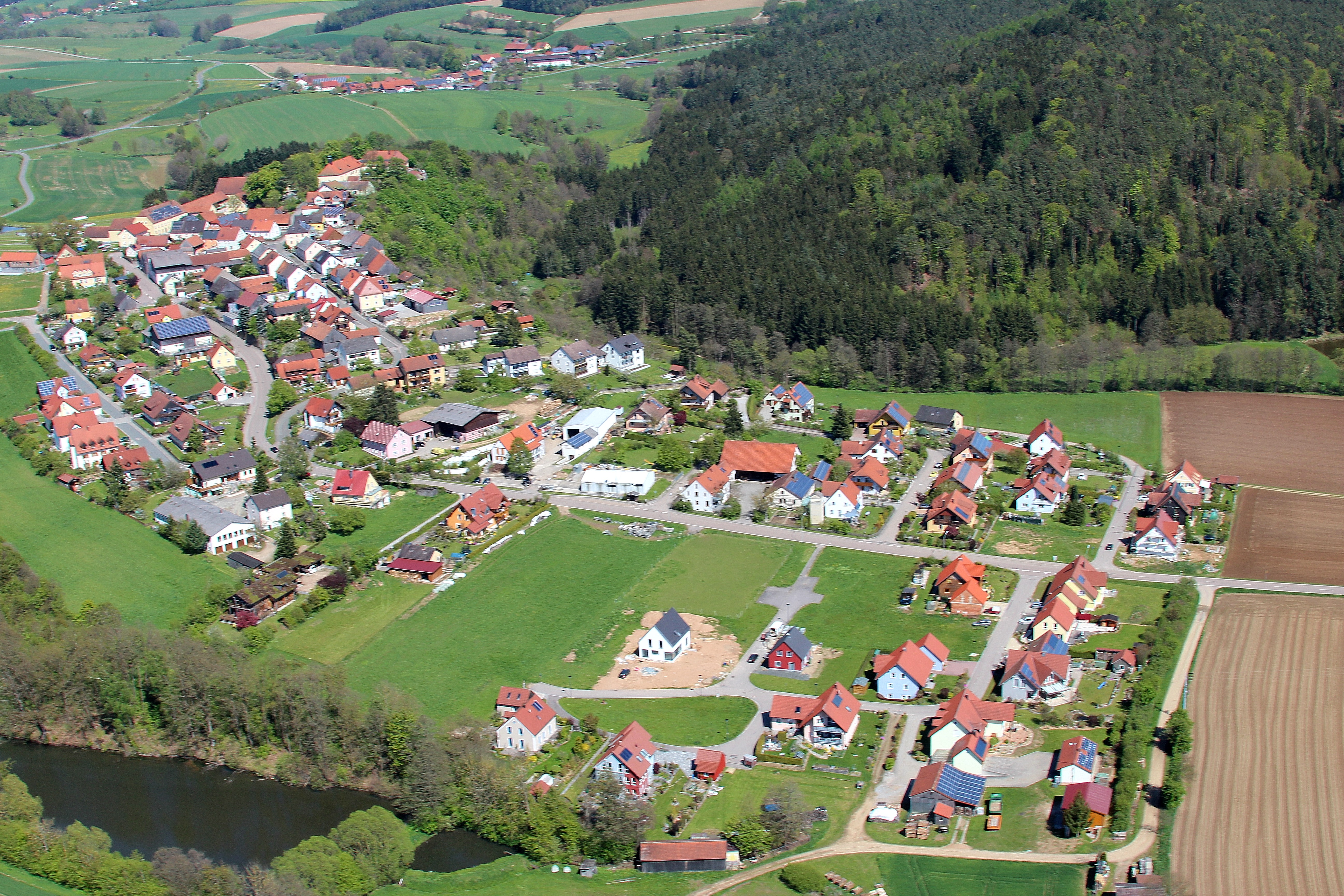 Guteneck, Landkreis Schwandorf, Oberpfalz, Bayern